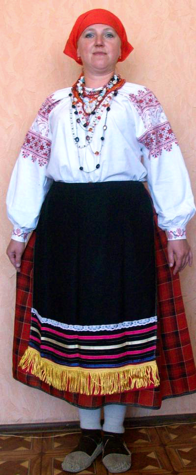 Россошь, Одинцовка. Традиционный костюм Репьевского района Воронежской области.